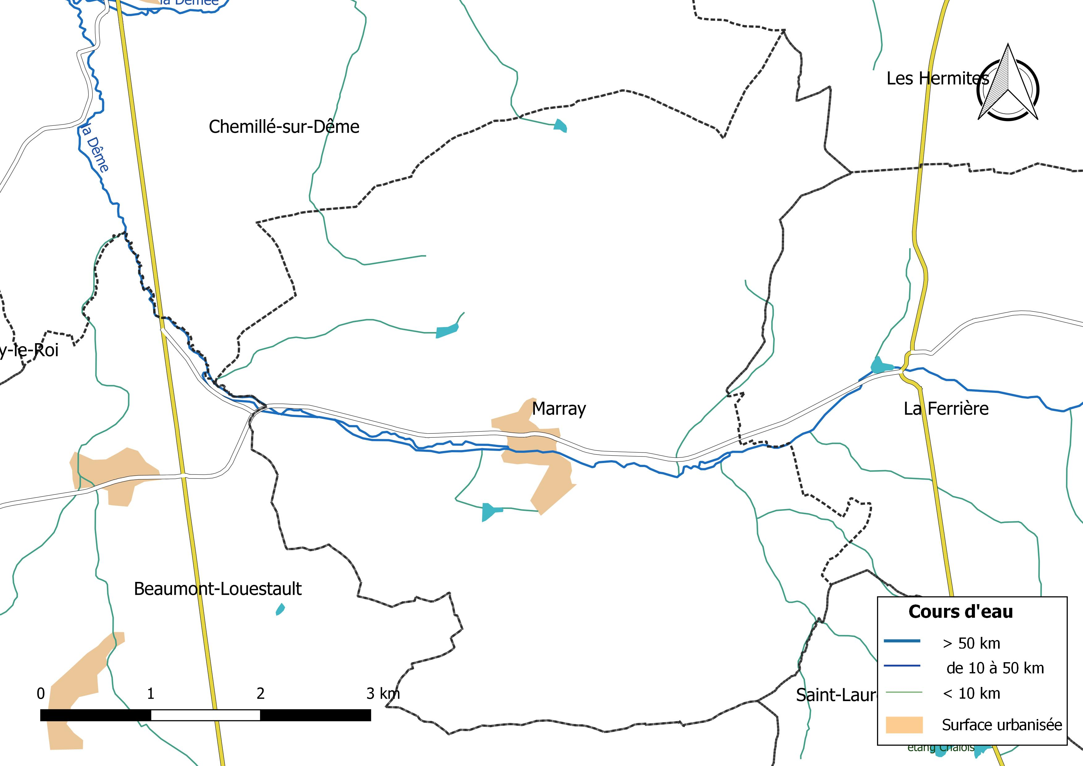 Carte du réseau hydrographique de la commune de Marray (France).